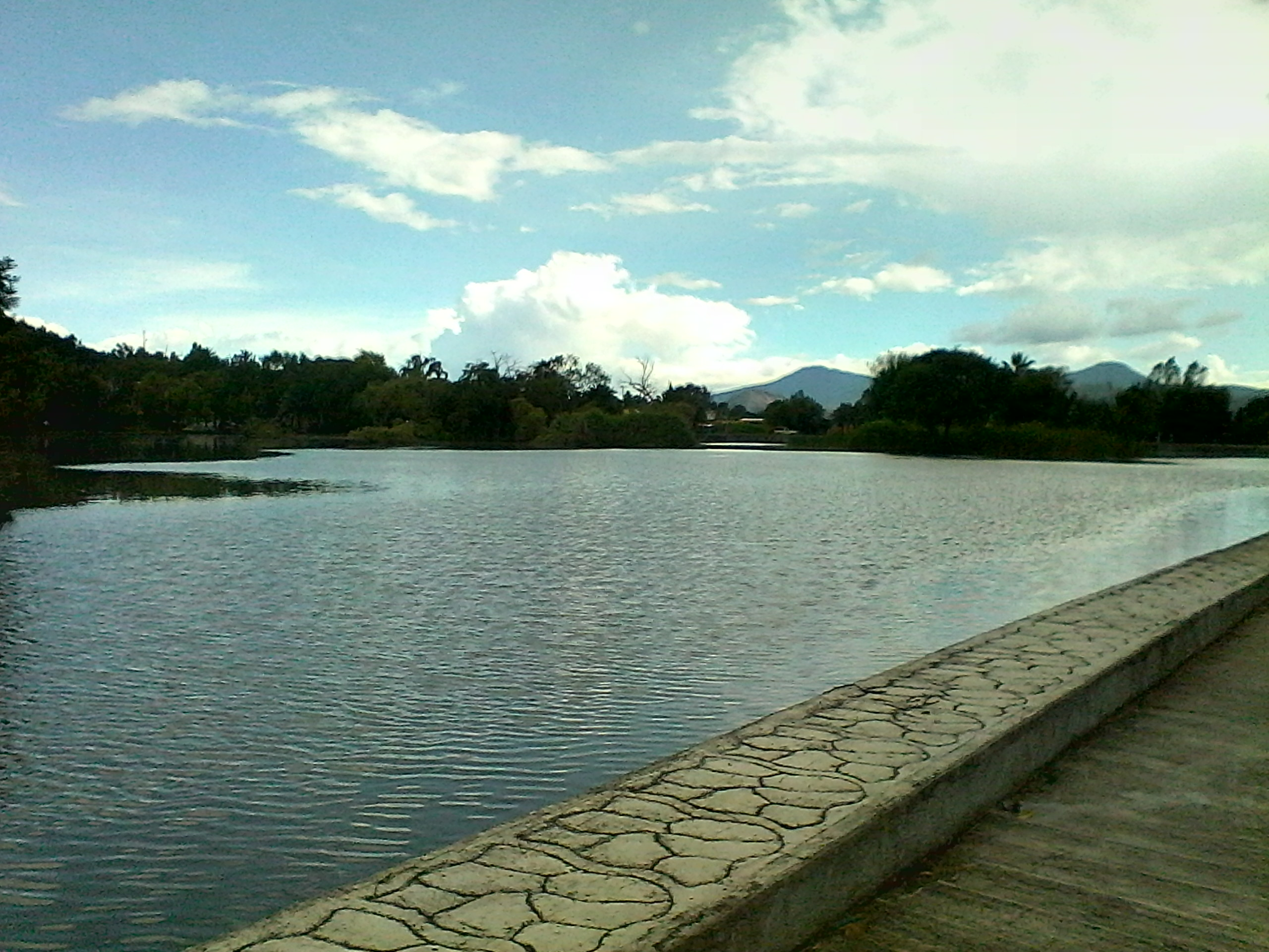 Vista a la Laguna de Bellas Fuentes desde la Plaza de la localidad